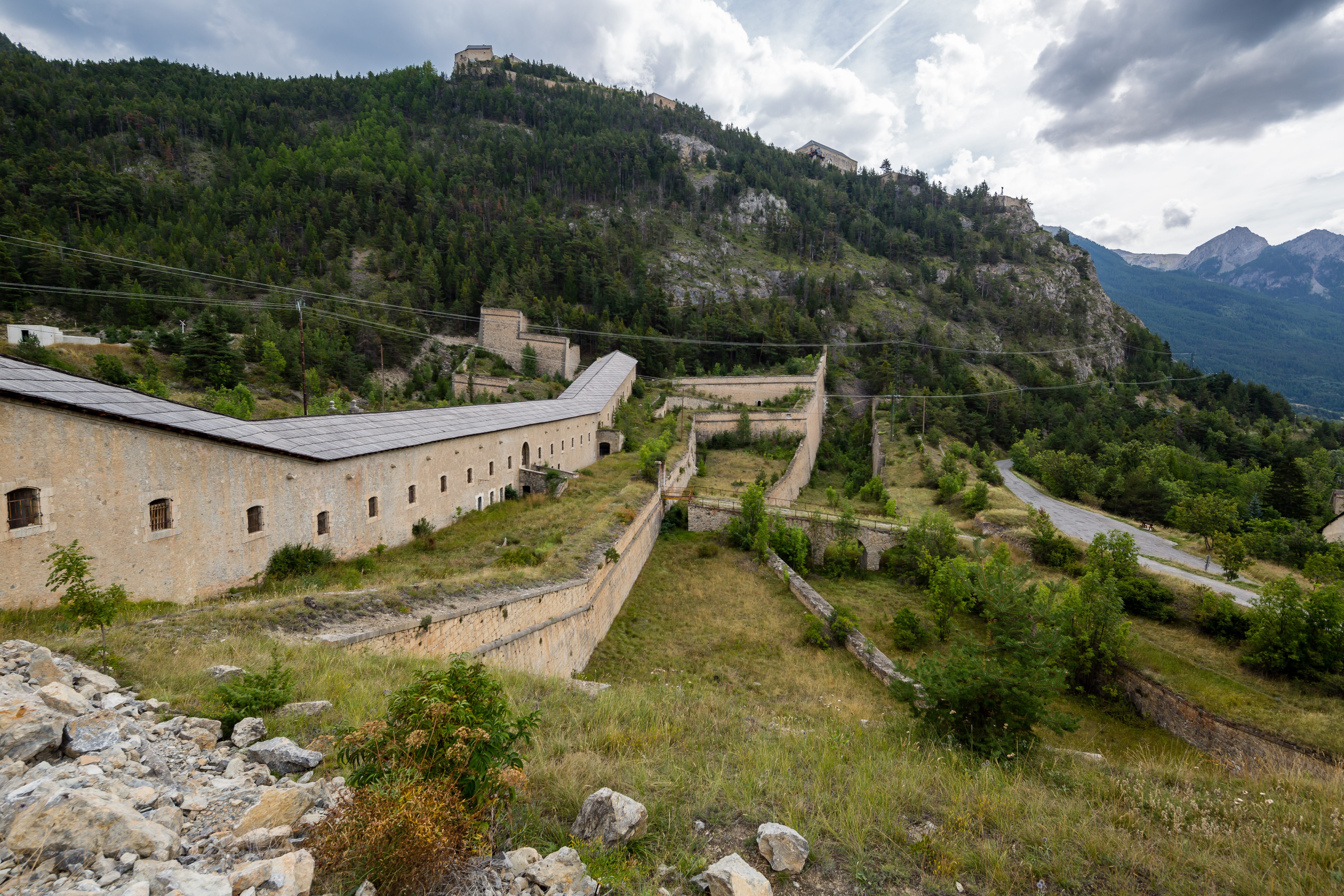 La communication Y vue du nord, sous le fort du Randouillet, à Briançon (France).